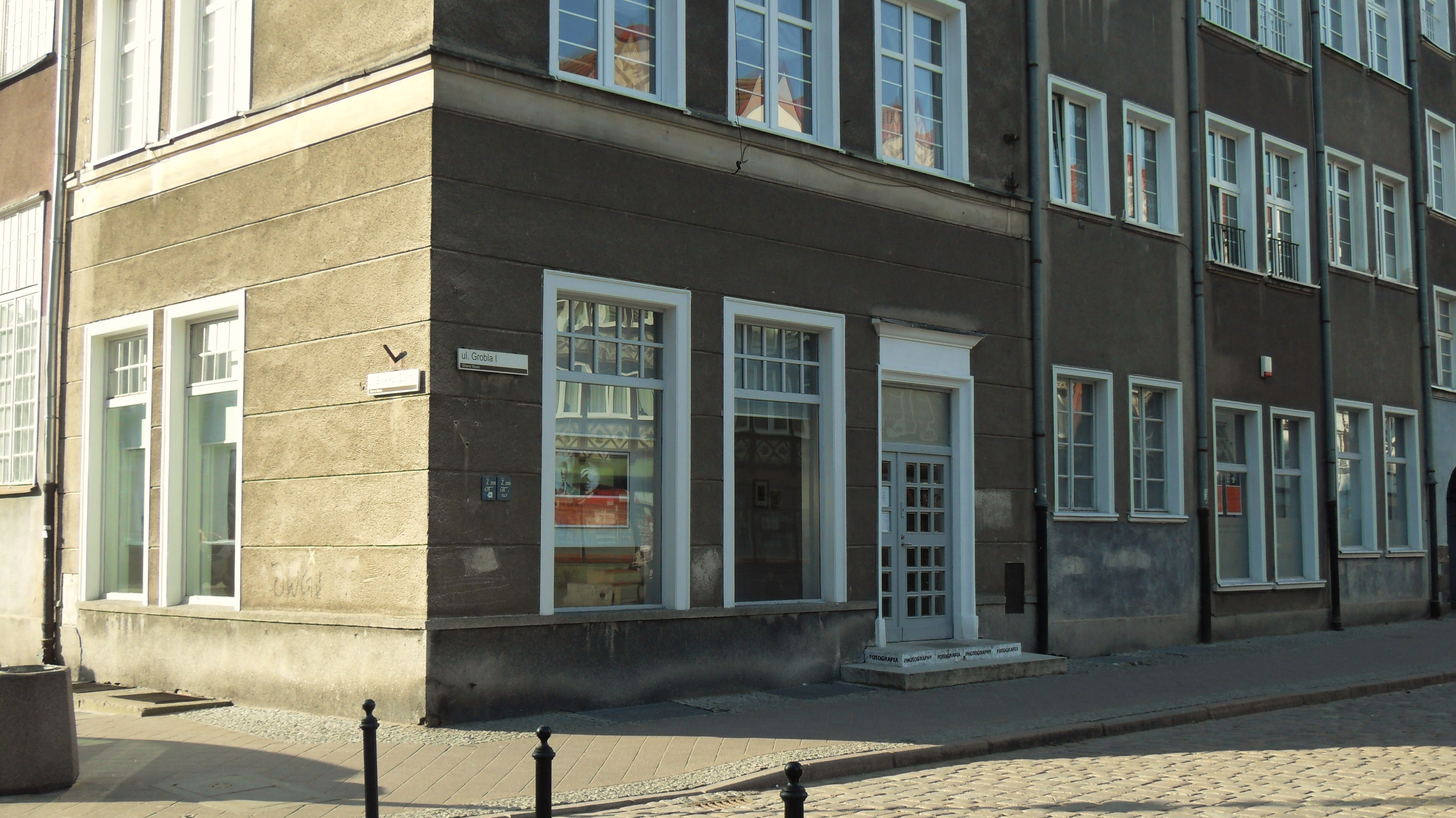 Gdańsk, ul. Grobla I 3/5 (róg św. Ducha), Gdańska Galeria Fotografii (w 2015 r. przeniesiona do Bramy Zielonej).